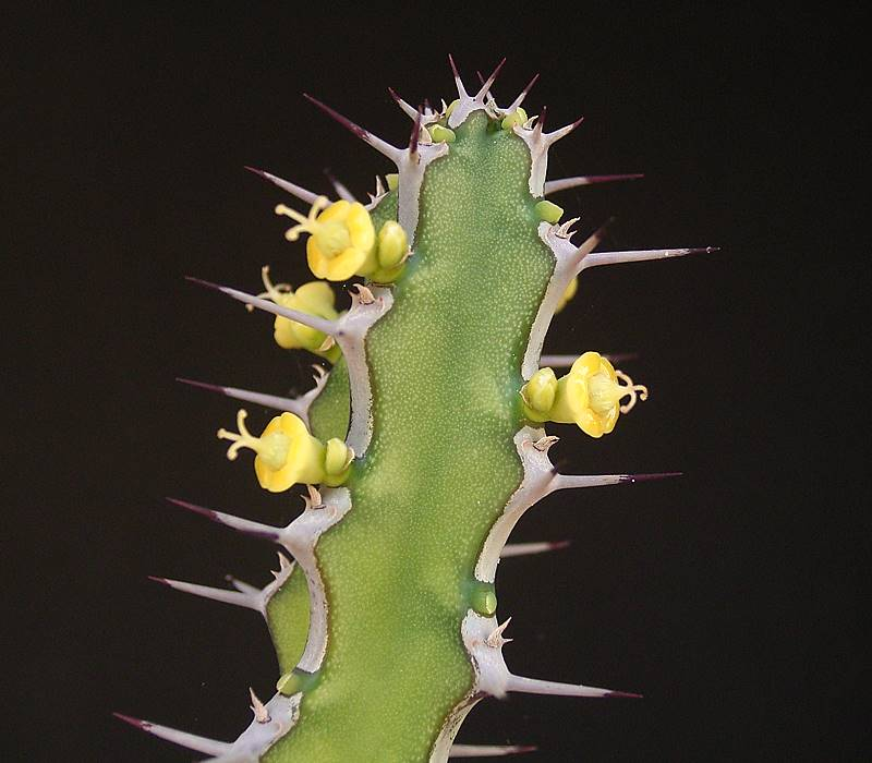 Euphorbia petraea